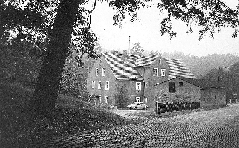 Original image description from the Deutsche FotothekKönigsbrück-Gräfenhain. Wassermühle